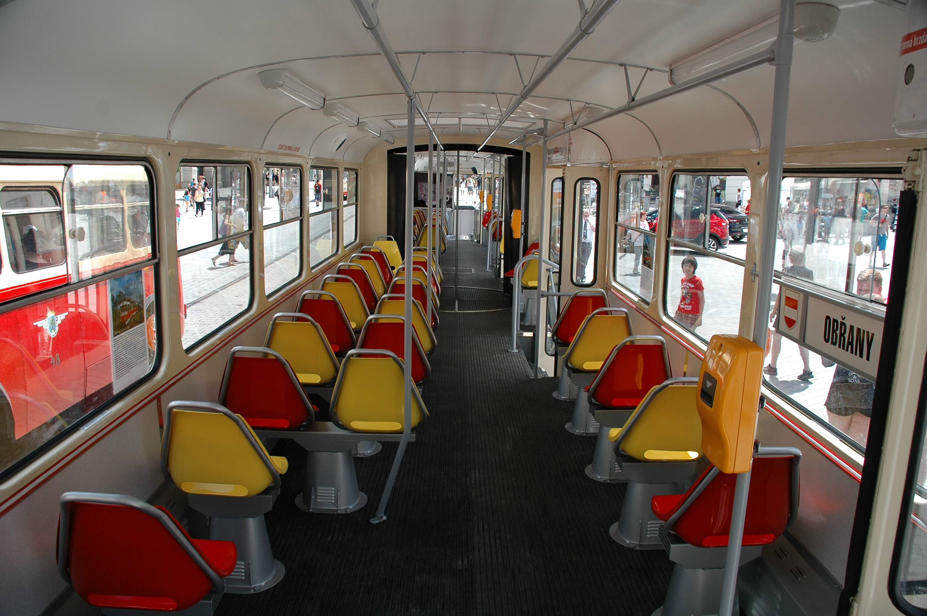 Nově zrekonstruovaná retro tramvaj K2YU ev. č. 1123 na dopravní nostalgii 2016 (DPMB)